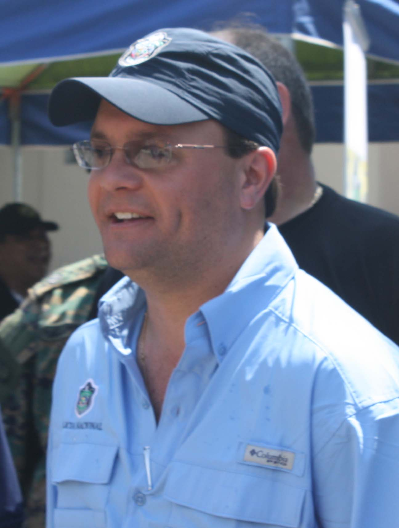 Ing. Julio Armando Moltó Alain - Director General de la Policía Nacional de Panamá. Foto tomada en la Feria Familiar de la Policía Nacional en el marco de la Semana del Policía 2012.